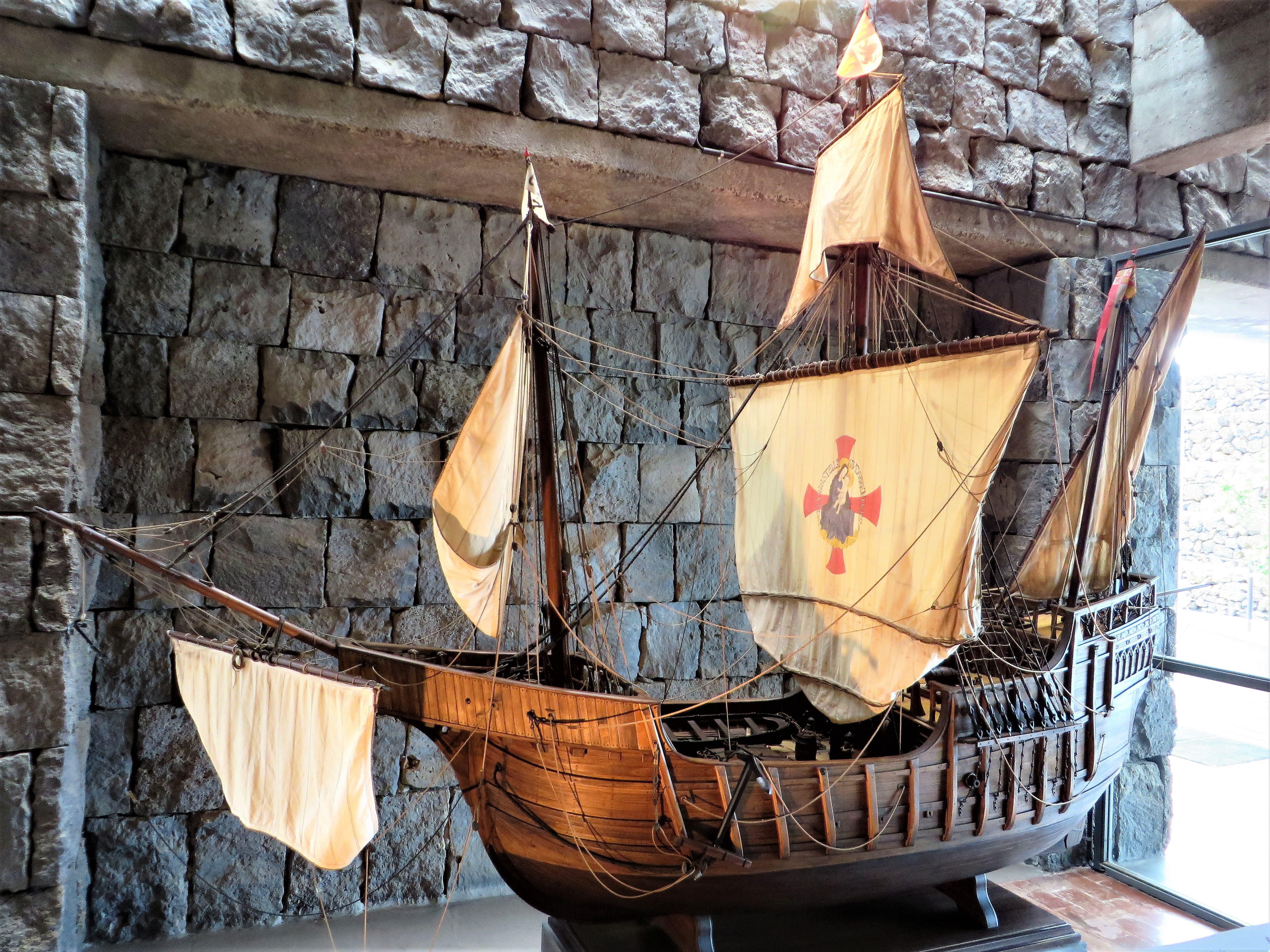 Modell des Flagschiffs von Christoph Kolumbus im Museum Guimar